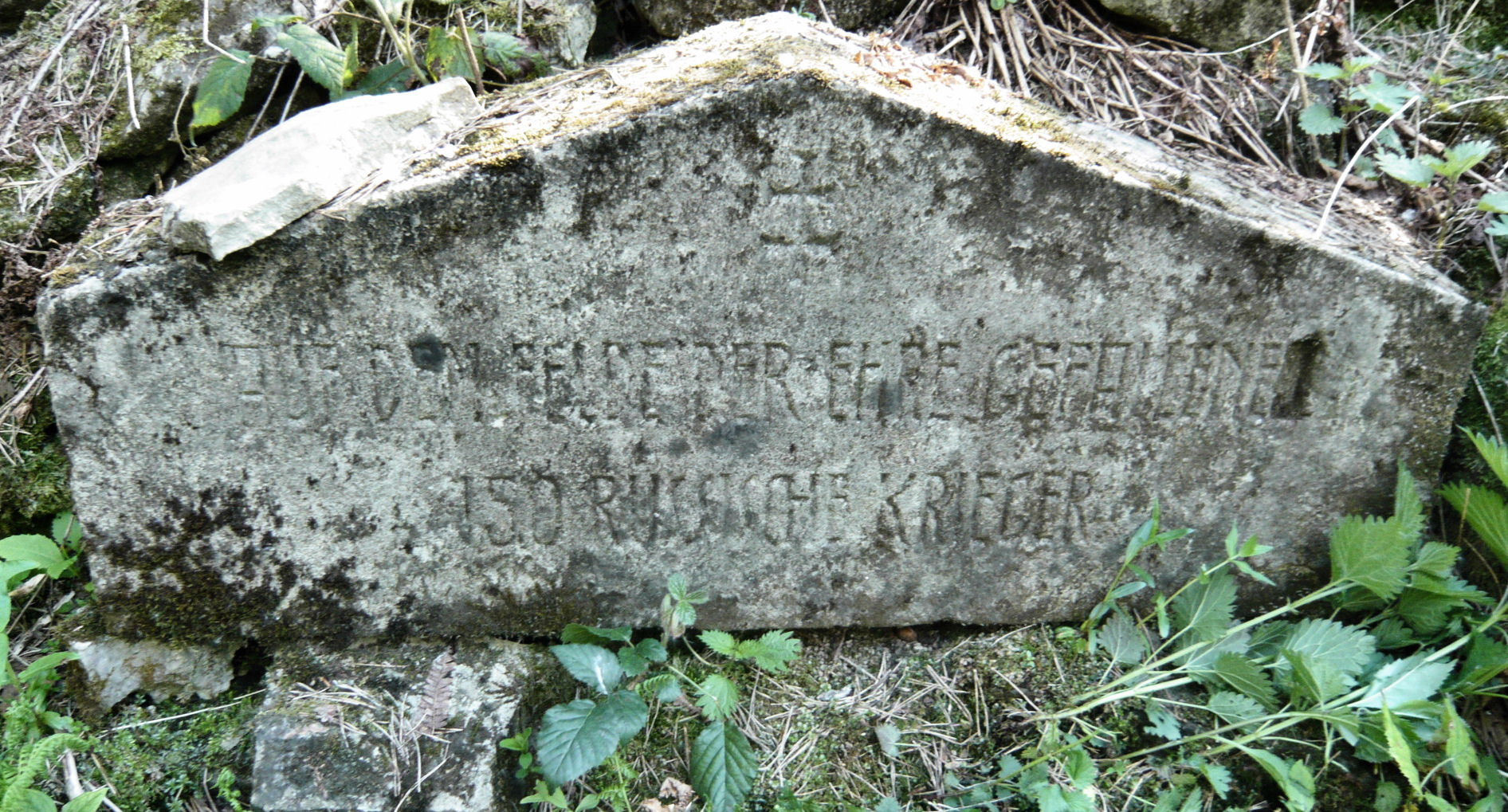 Cmentarz wojskowy nr 2 - Ożenna